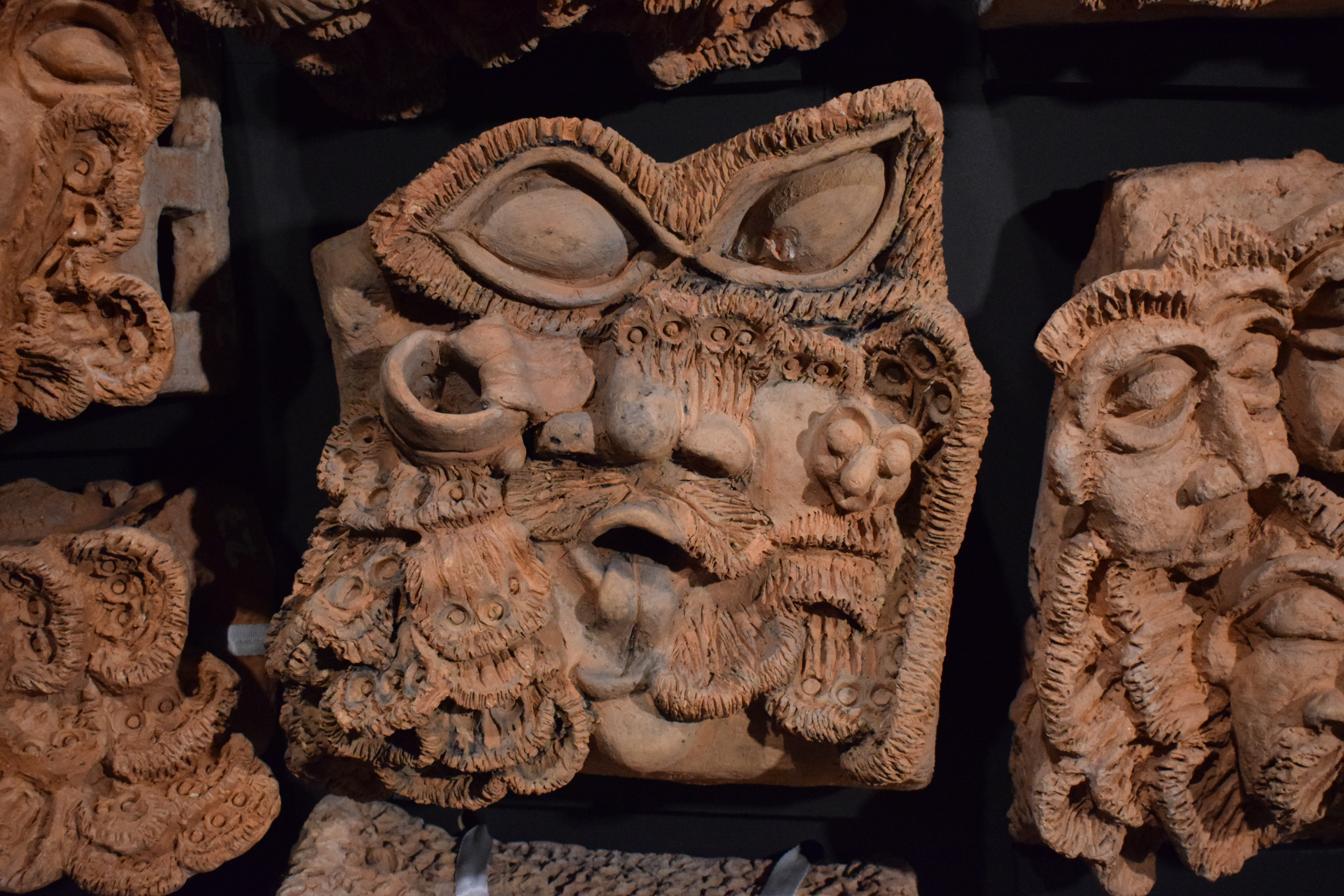 Vue de la Collection de l'art brut à Lausanne, dans le canton de Vaud en Suisse.